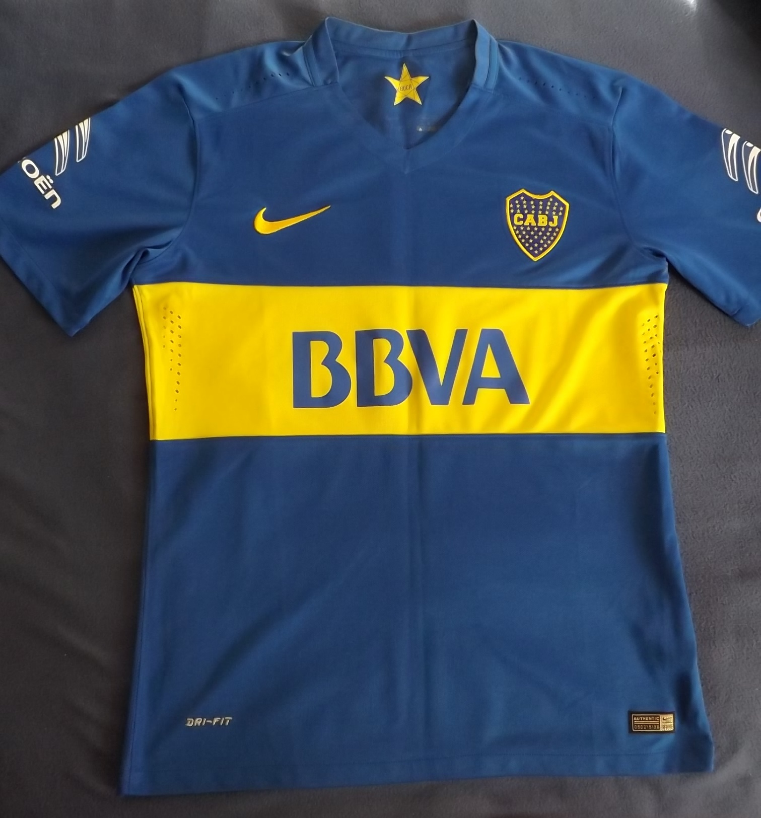 Camiseta titular de C.A. Boca Juniors 2016